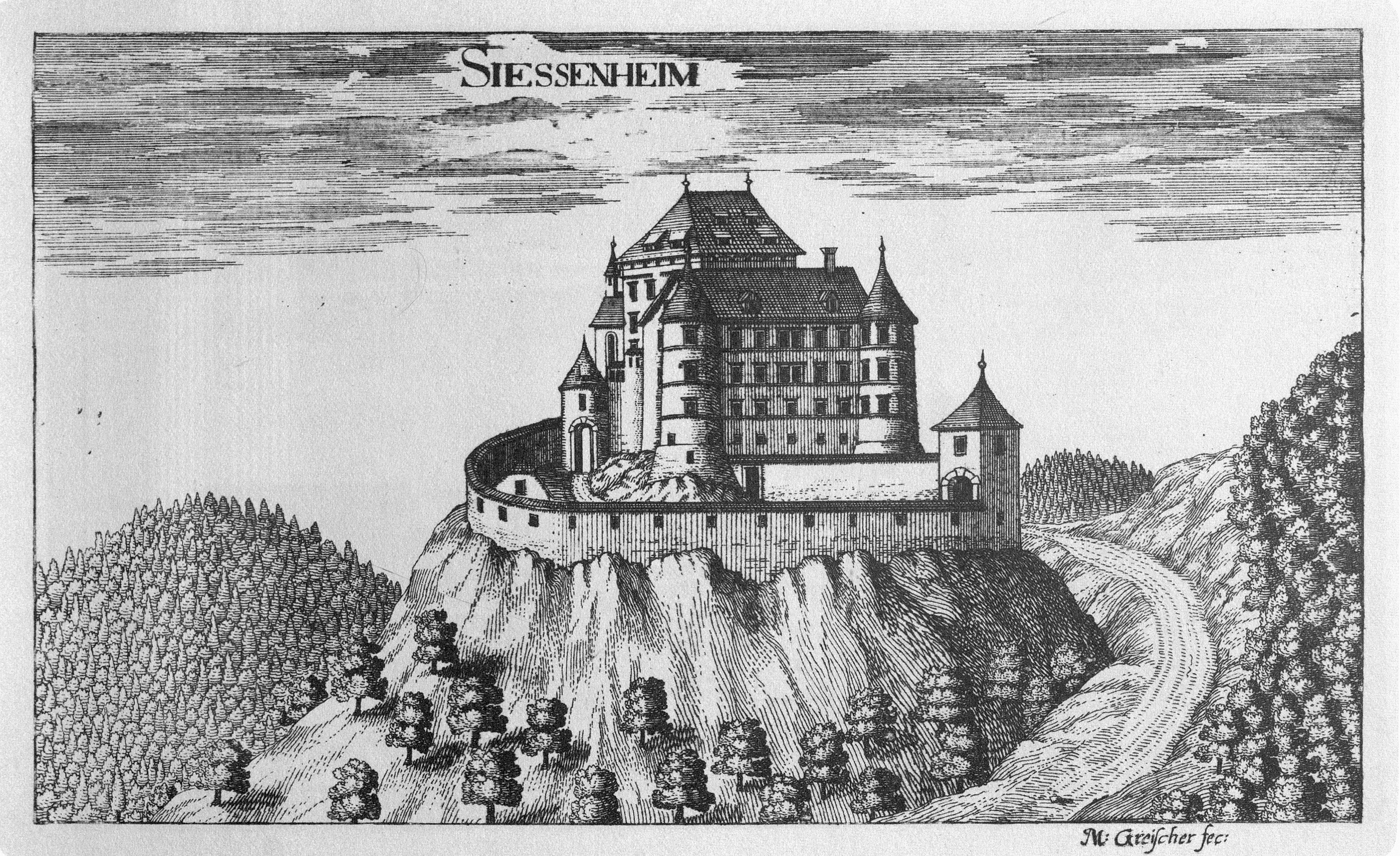 G. M. Vischers Käyserlichen Geographi, Topographia Ducatus Stiriae, Das ist: Eigentliche Delineation / und Abbildung aller Städte / Schlösser / Marcktfleck / Lustgärten / Probsteyen / Stiffter / Clöster und Kirchen / so es sich im Herzogthumb Steyrmarck befinden; Und anjetzo Umb einen billichen Preyß zu finden seynd Bey Johann Bitsch Universitäts Buchhandlern / Auff dem Juden=Platz bey der guldenen Saulen. Graz 1681 Die Nummerierung der Dateien folgt der alphabetischen Reihung der Ortsnamen und entspricht nicht dem Vischer-Register